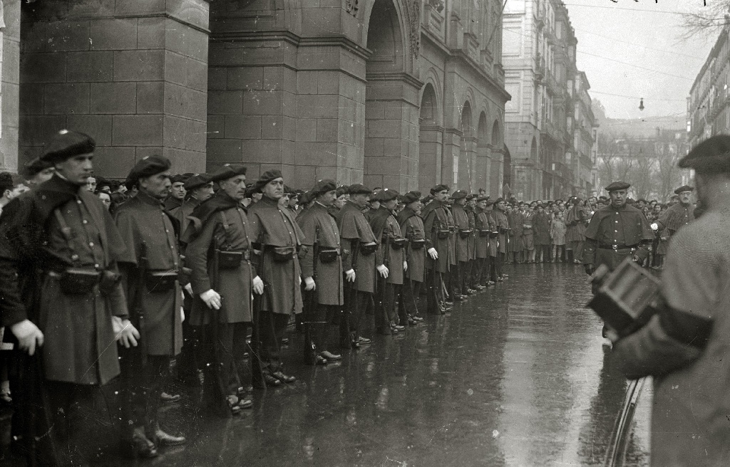 Título original: Miqueletes en formación (1/2) Localización: Guipúzcoa